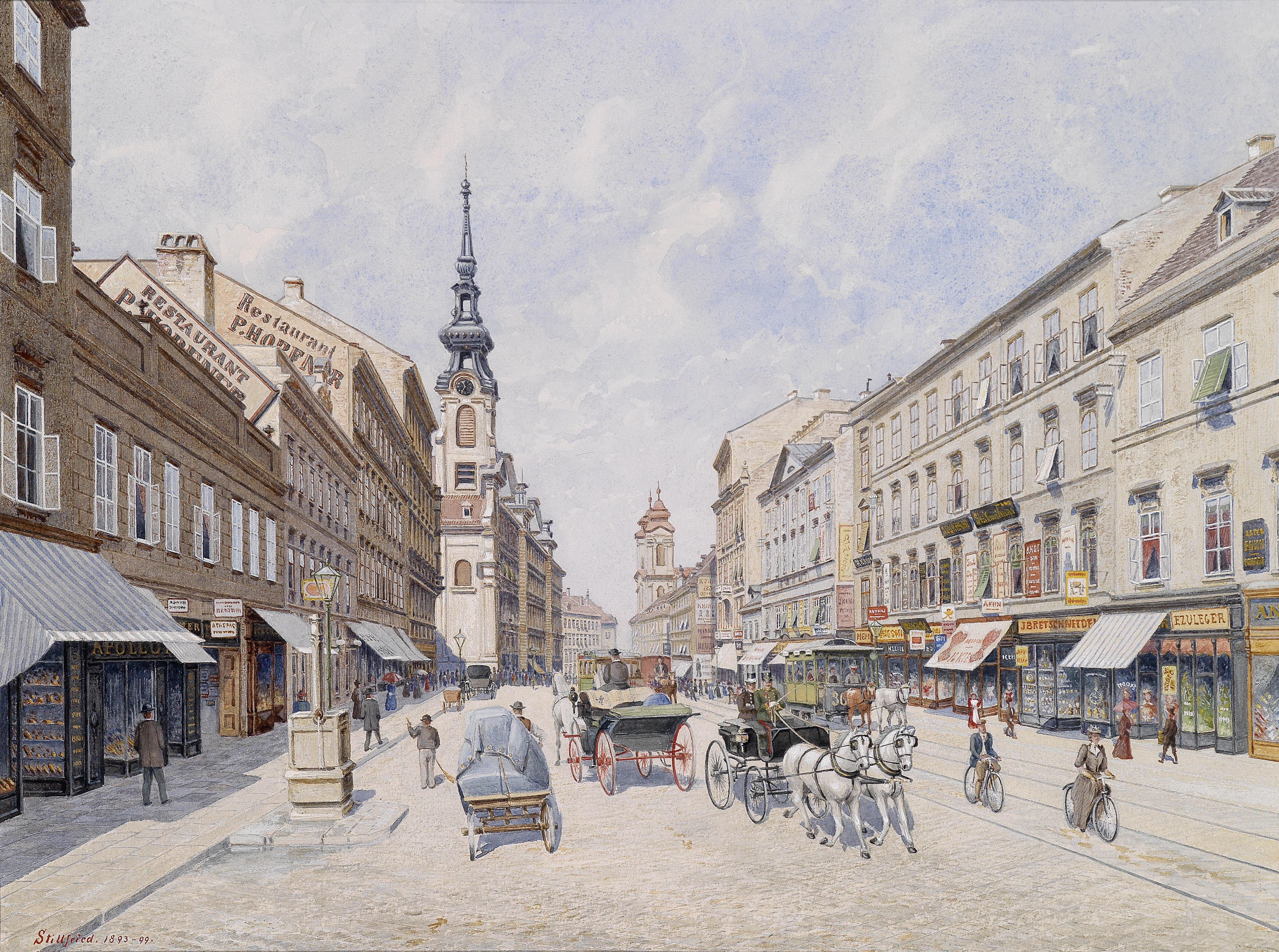 Die innere Mariahilferstraße